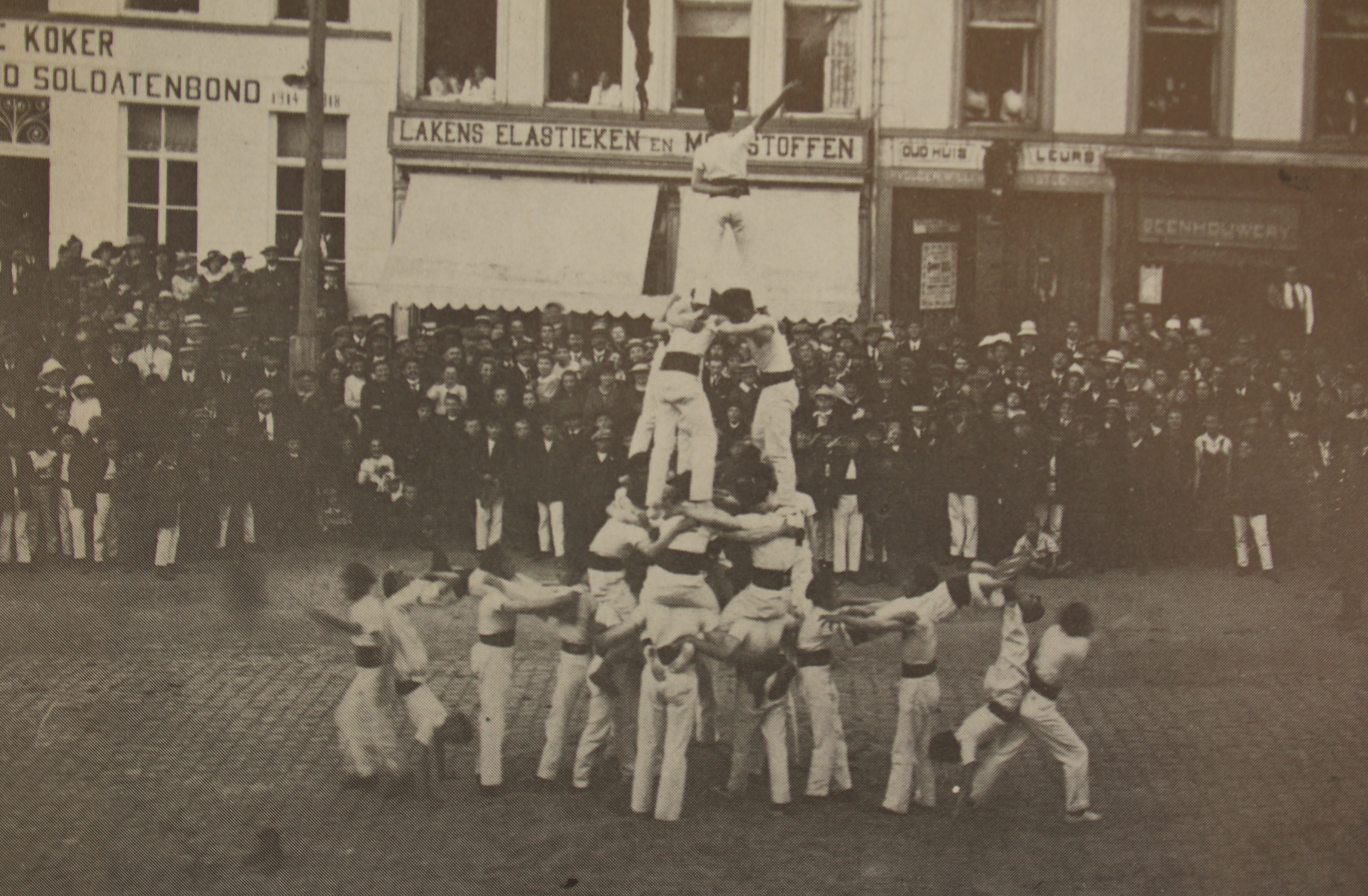 Turnoptreden Turnkring EWB 1920 Heldenlaan Zottegem